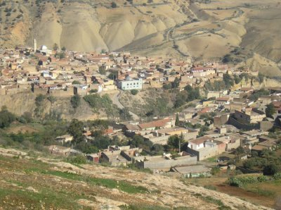 Mazouna